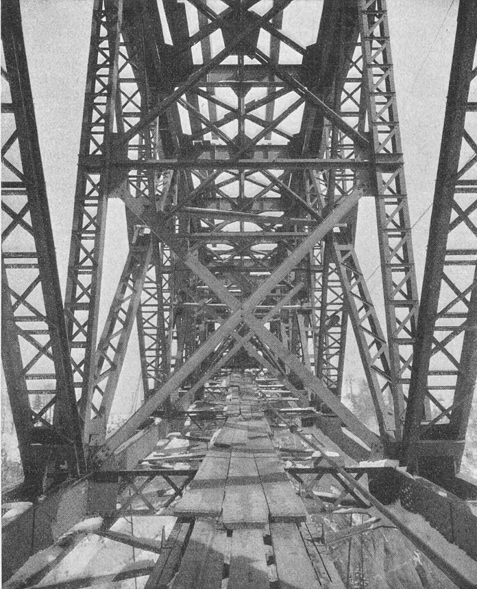 Sitterviadukt der Bodensee-Toggenburg-Bahn: Blick in das Innere des Zwischenträgers